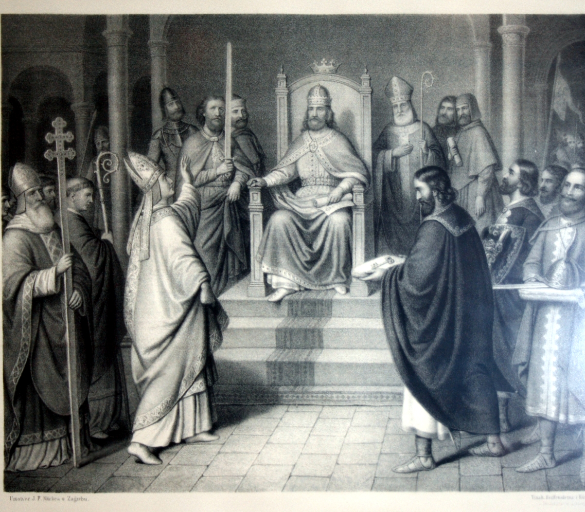 Petra Krešimira IV. priznaju za kralja grad i Nadbiskupija Splitska, J. F. Mücke, Reiffenstein & Röch, Zagreb; Beč, 1868. godine , snimljeno tijekom Noći muzeja